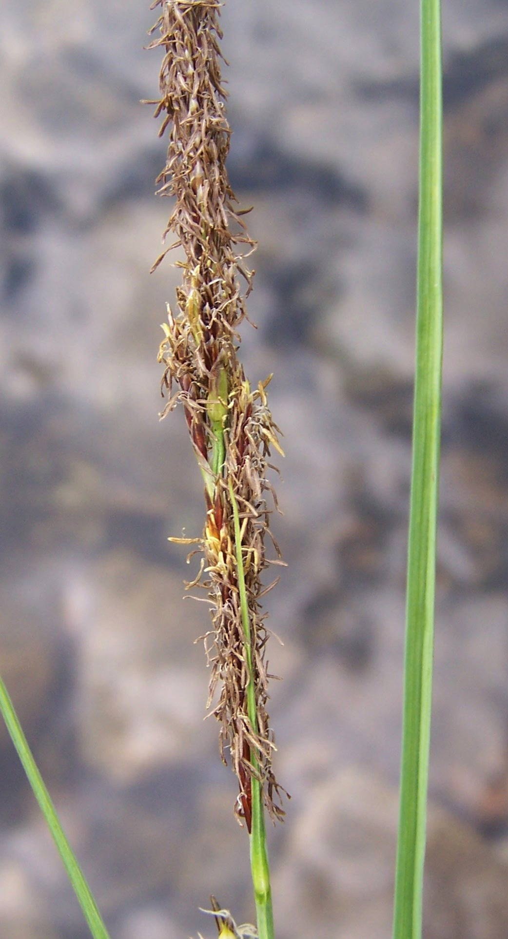 Carex rostrata (pl. turzyca dzióbkowata), habitat: Tatra Mountains, Dolina Gąsienicowa, Staw Litmanowy Gąsienicowy